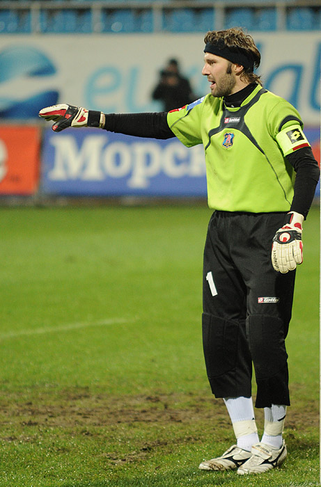 Виталий Григорьевич Рева — украинский футболист, вратарь.